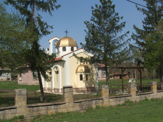 Church in Gospodinovo, Silistra, Bulgaria